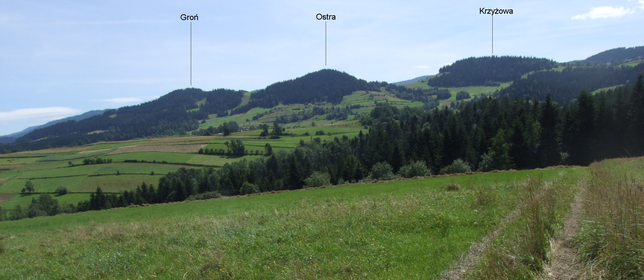 Widok od zachodniej strony